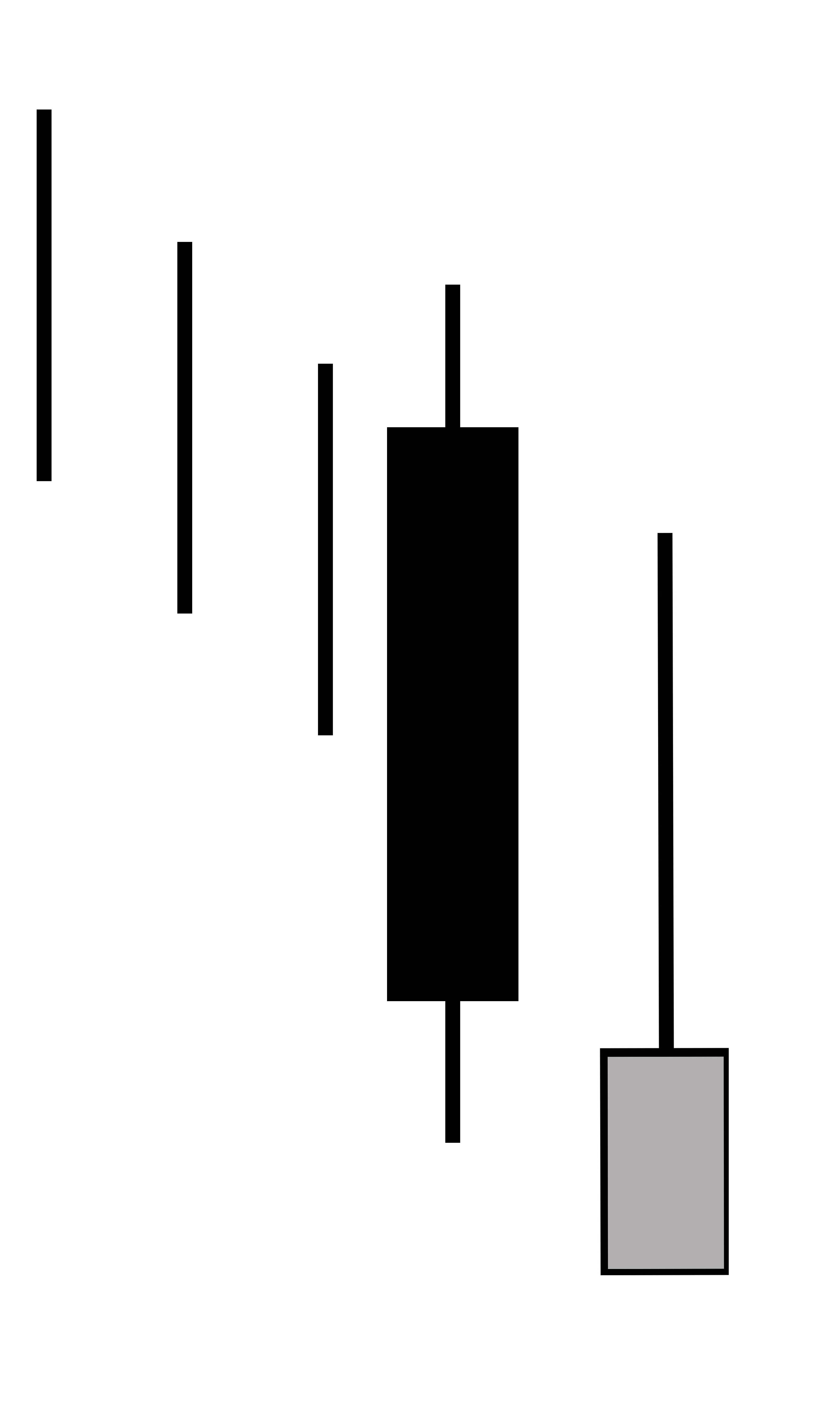 Inverted Hammer